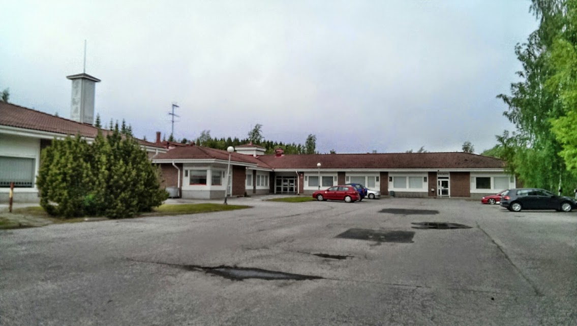 Ryttylän terveysasema ja kirjasto